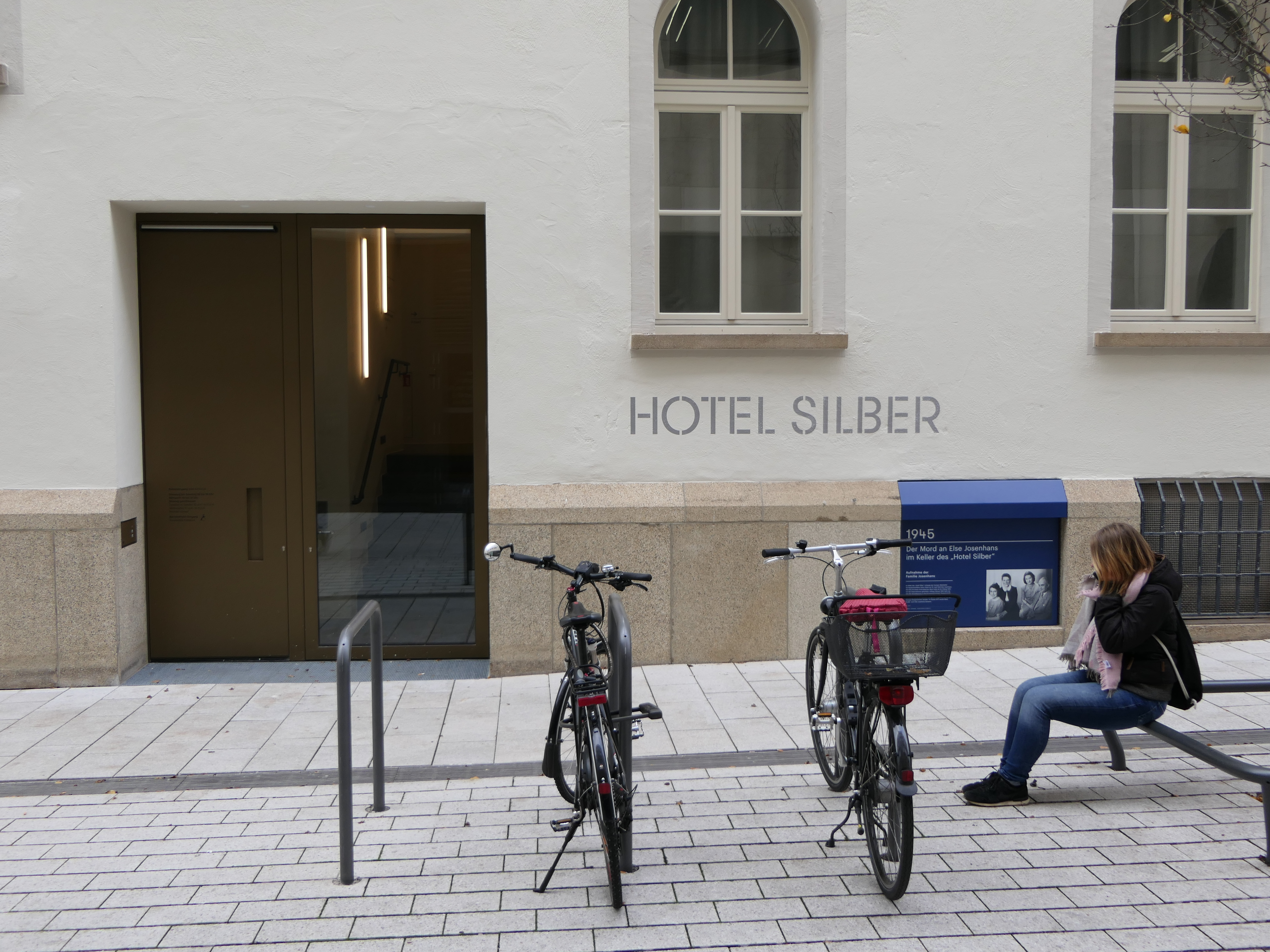 Das Hotel Silber nach seinem Umbau. Eingang samt Installationen auf der Rückseite.